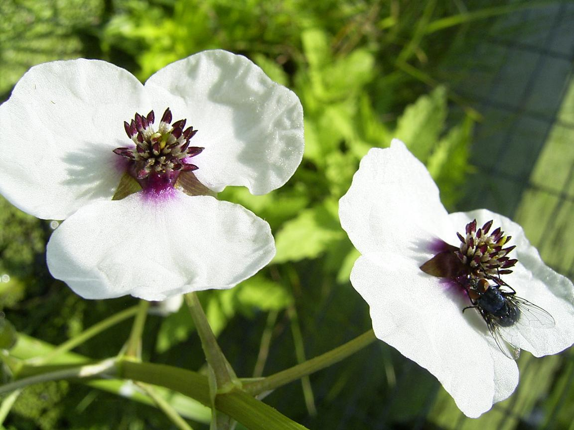 Gouda, juli 2004